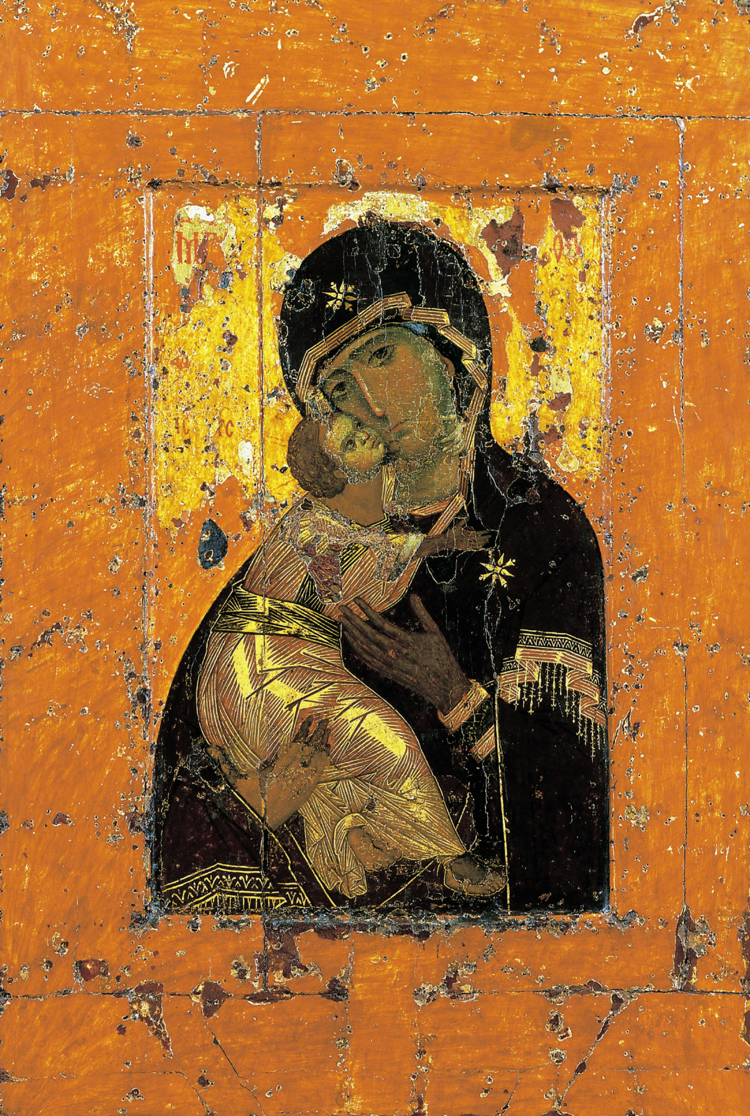 Владимирская иконаВизантия